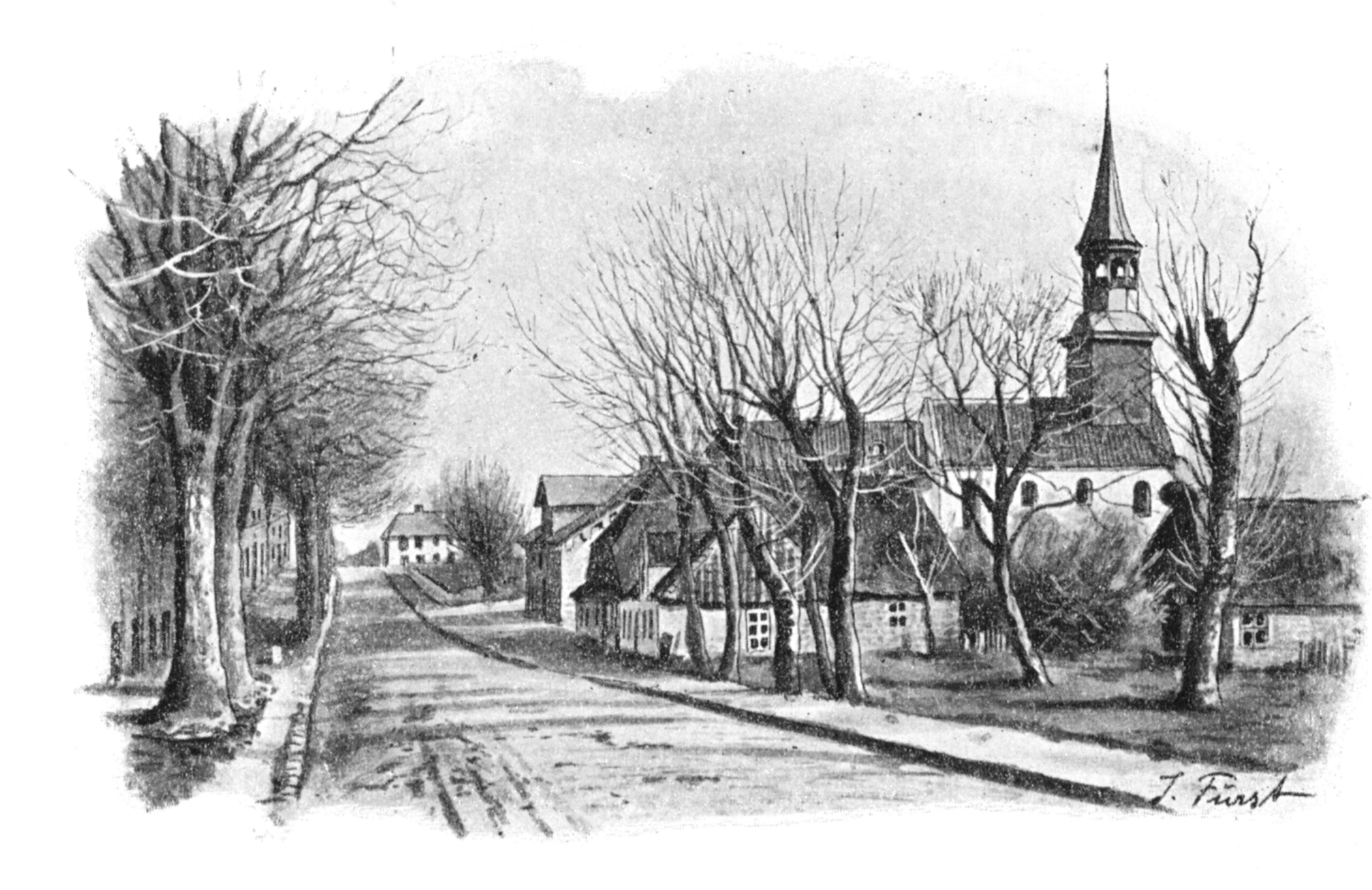 Lunden, St. Laurentiuskirche, Zeichnung von Julius Fürst um 1895